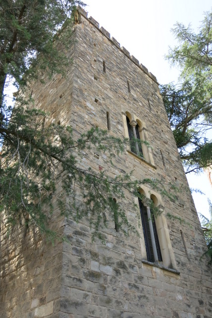 castell de Piera, Comarca Anoia - Catalunya